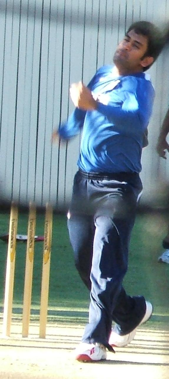 Mahendra Singh Dhoni bowlingat Adelaide Oval